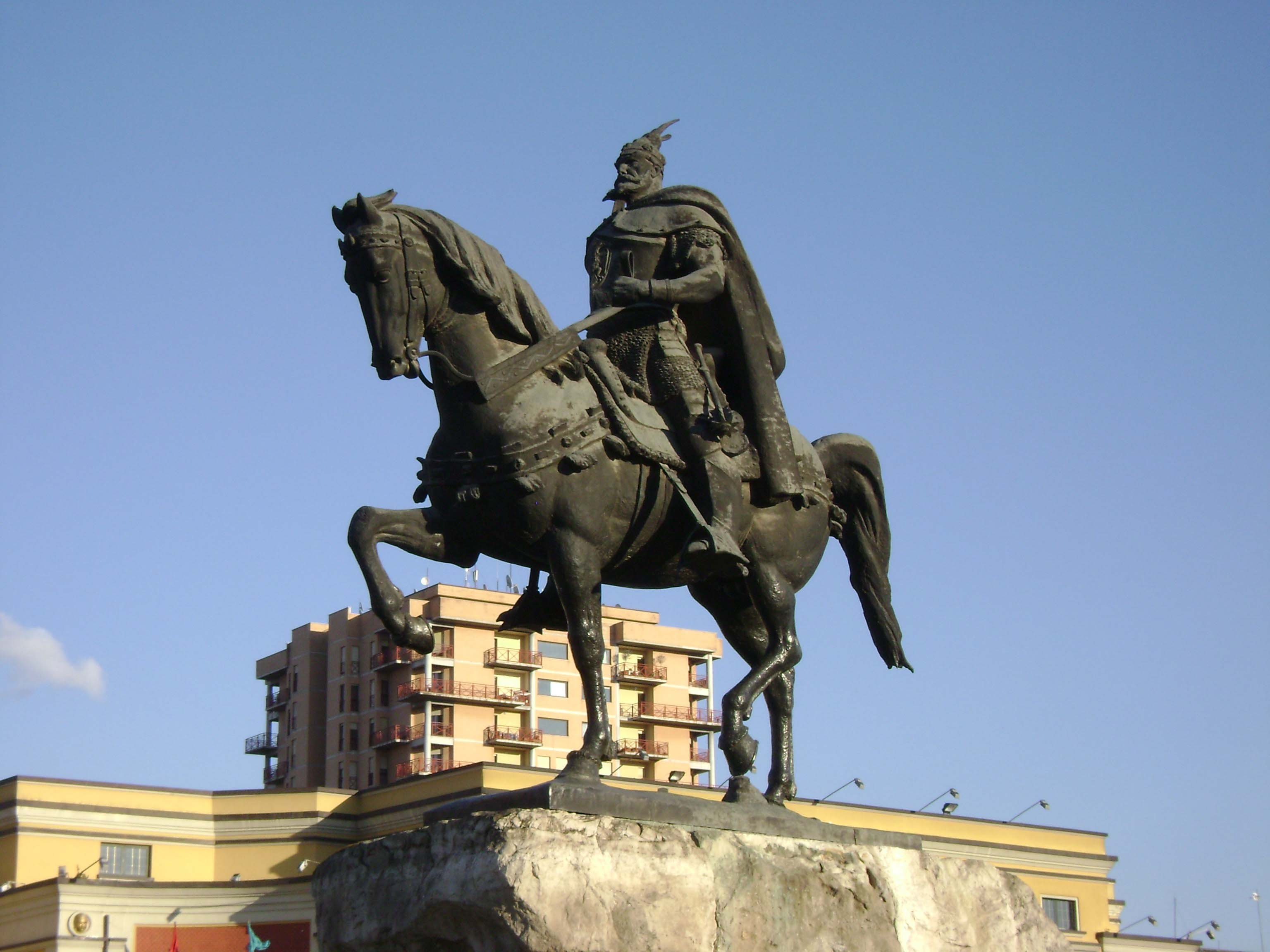 Een standbeeld van Skanderbeg in Tirana.